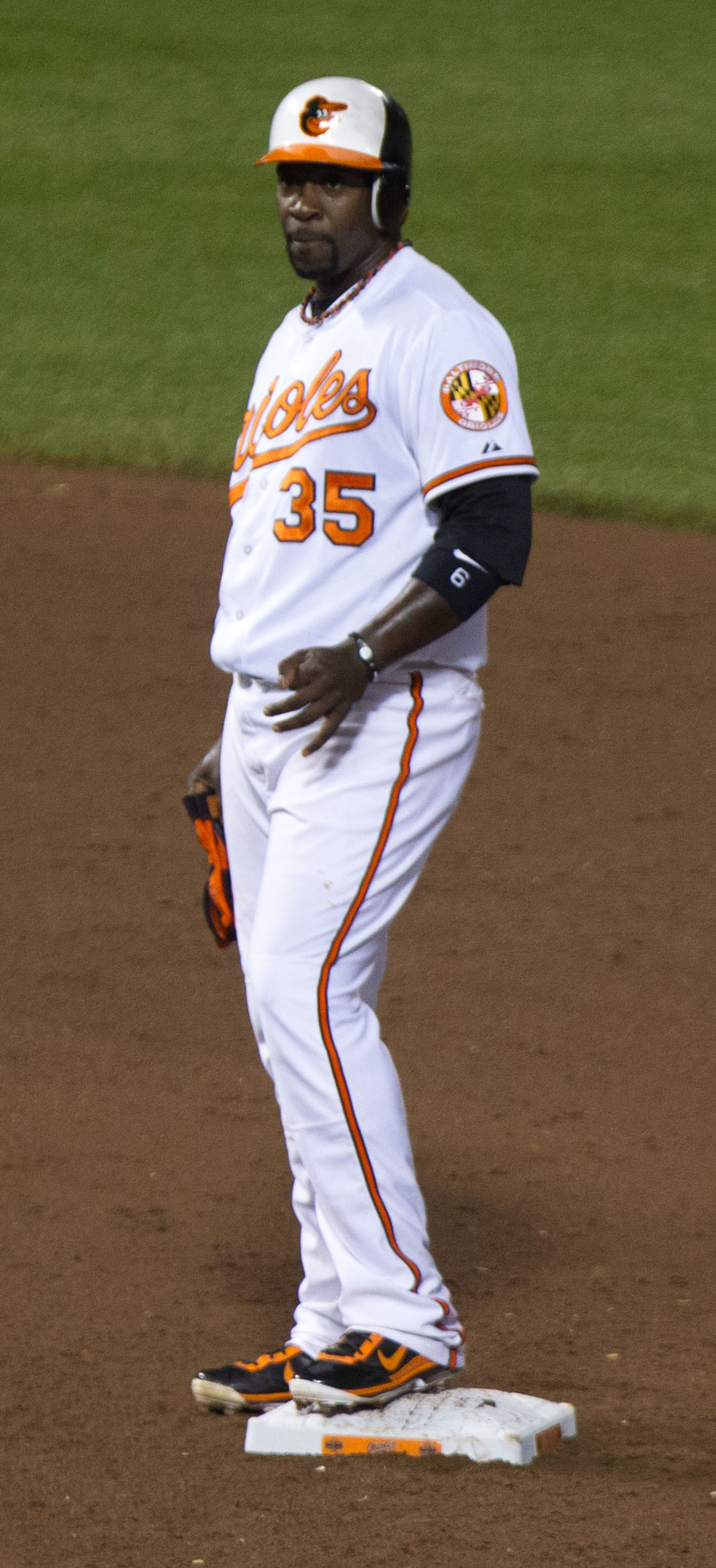 Bill Hall